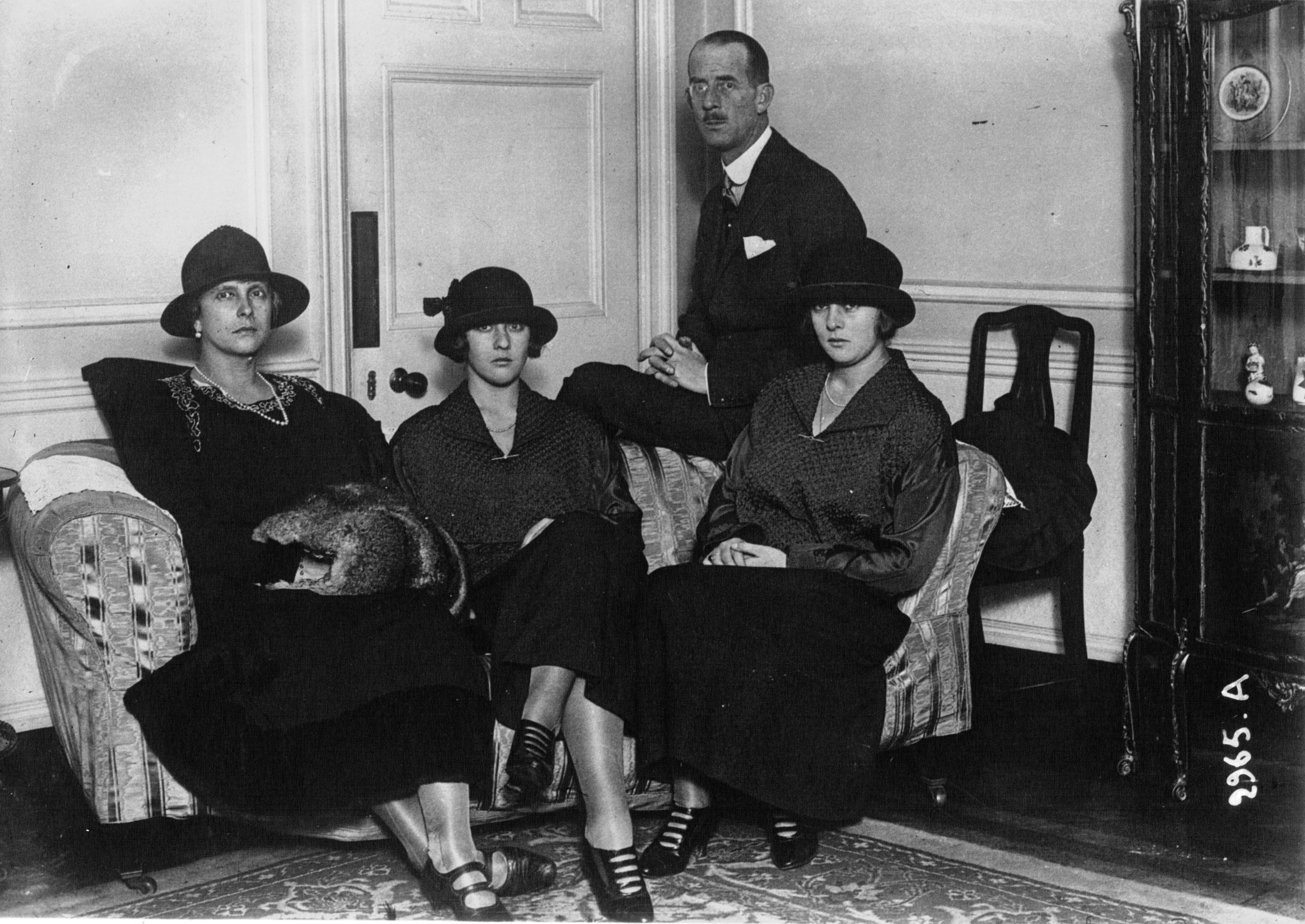 Le prince André de Grèce et sa famille à Londres.